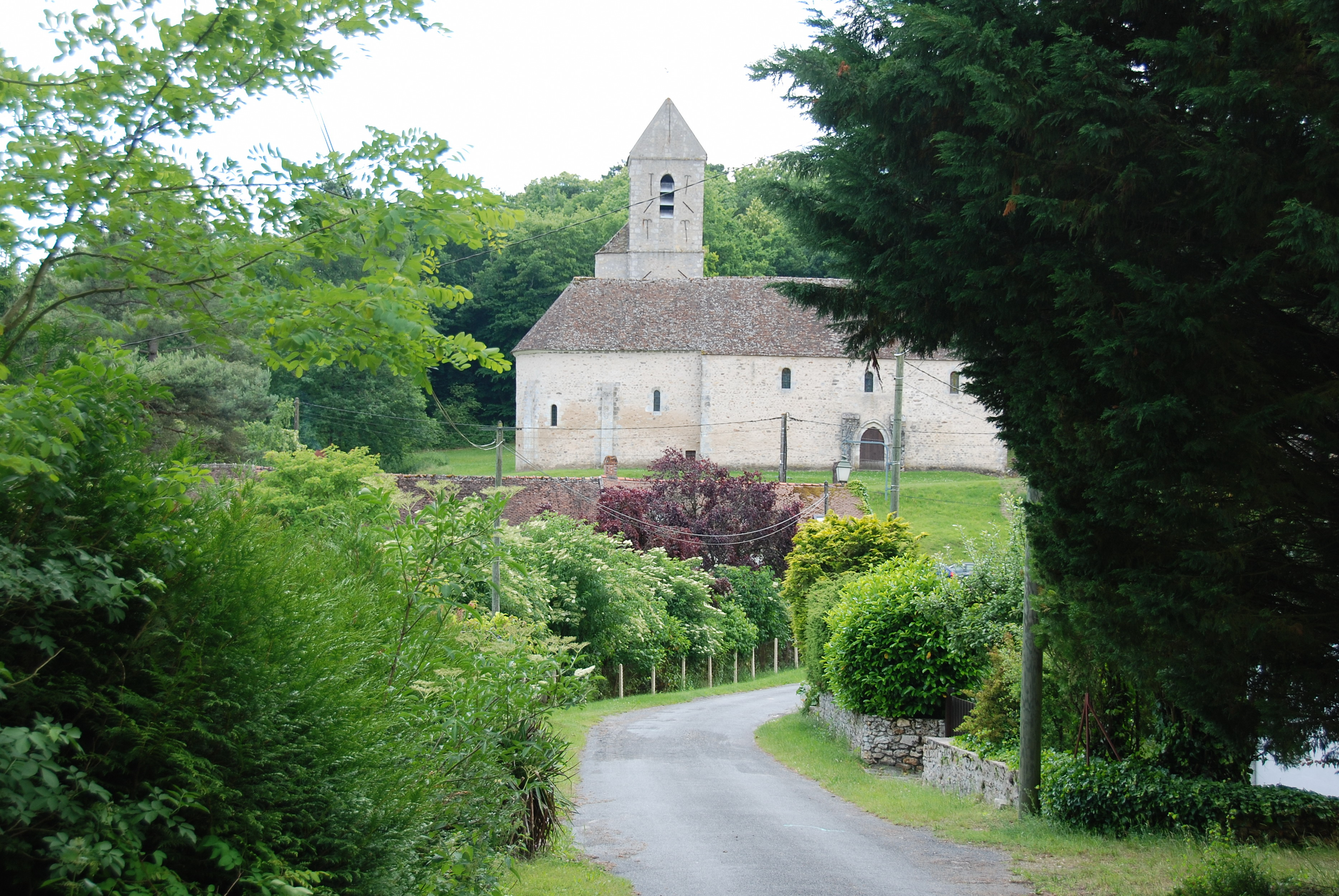 Eglise St Martin vue de la route du Fief